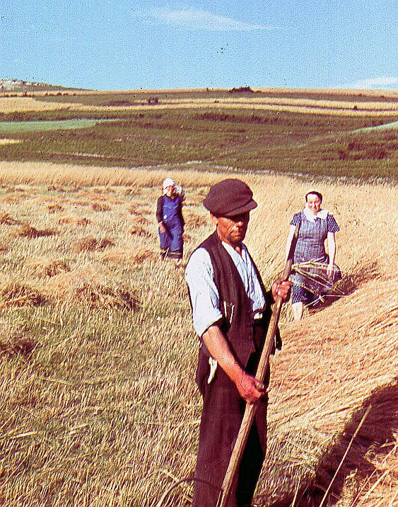 żniwa w okolicach Libiąża k. Chrzanowa (Małopolska), rok 1938 skan z małoobrazkowego (35mm) diapozytywu Agfa wykonanego aparatem Kodak Retina korekcja cyfrowa - Julo